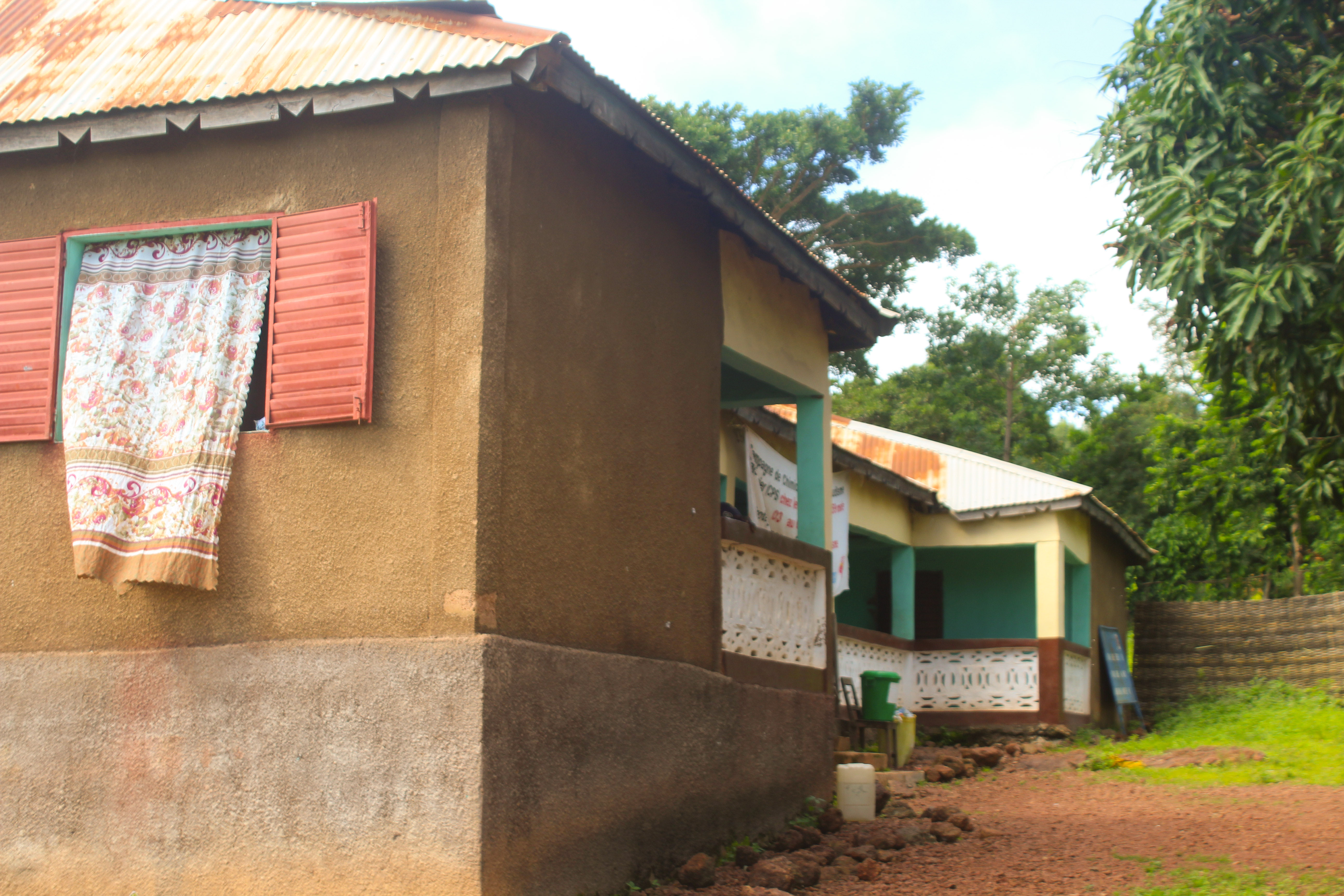 Façade du centre de Santé de Téliré